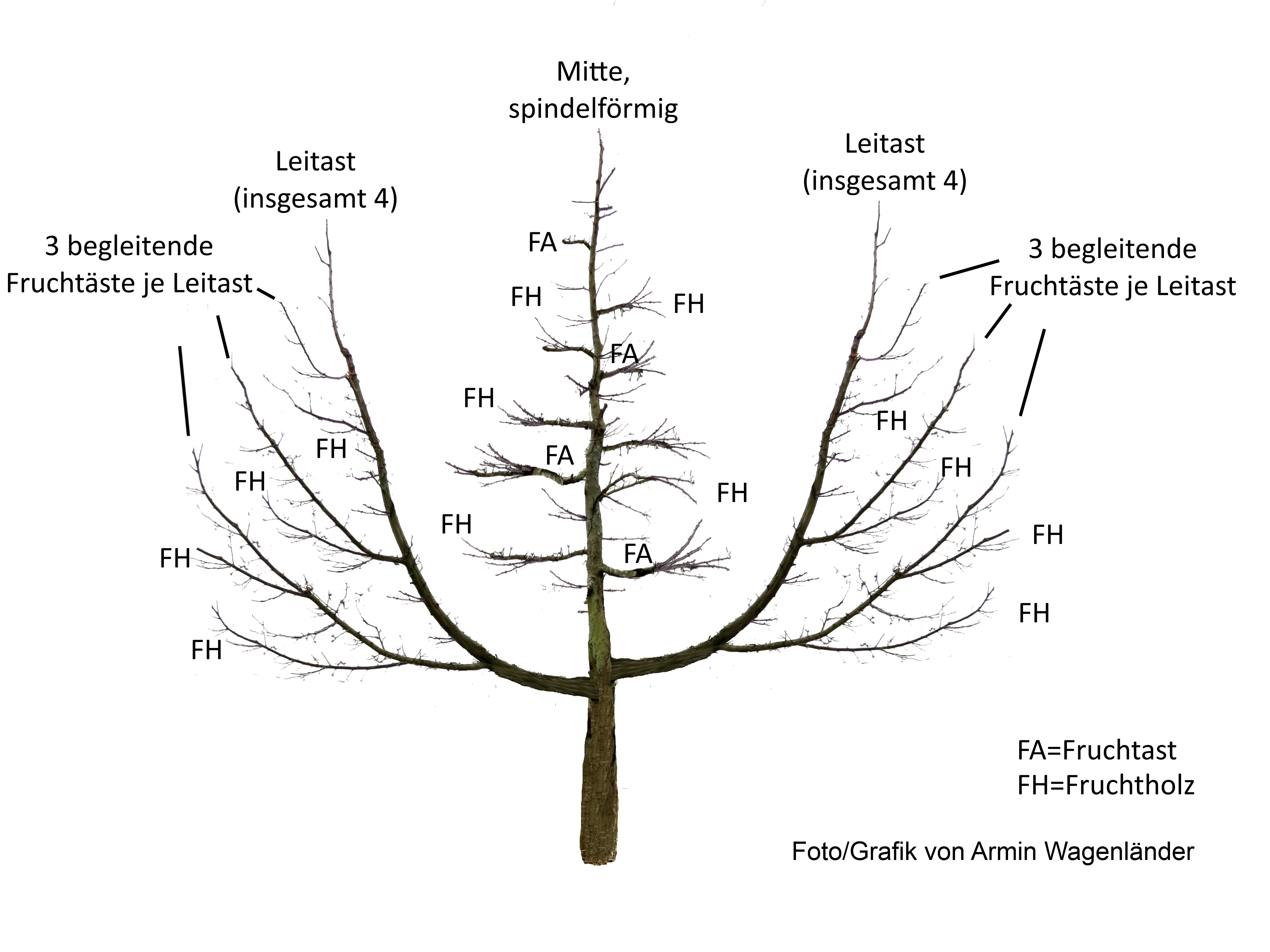 Das Bild zeigt einen typischen, nach dem Oeschbergschnitt geschnittenen Obstbaum.